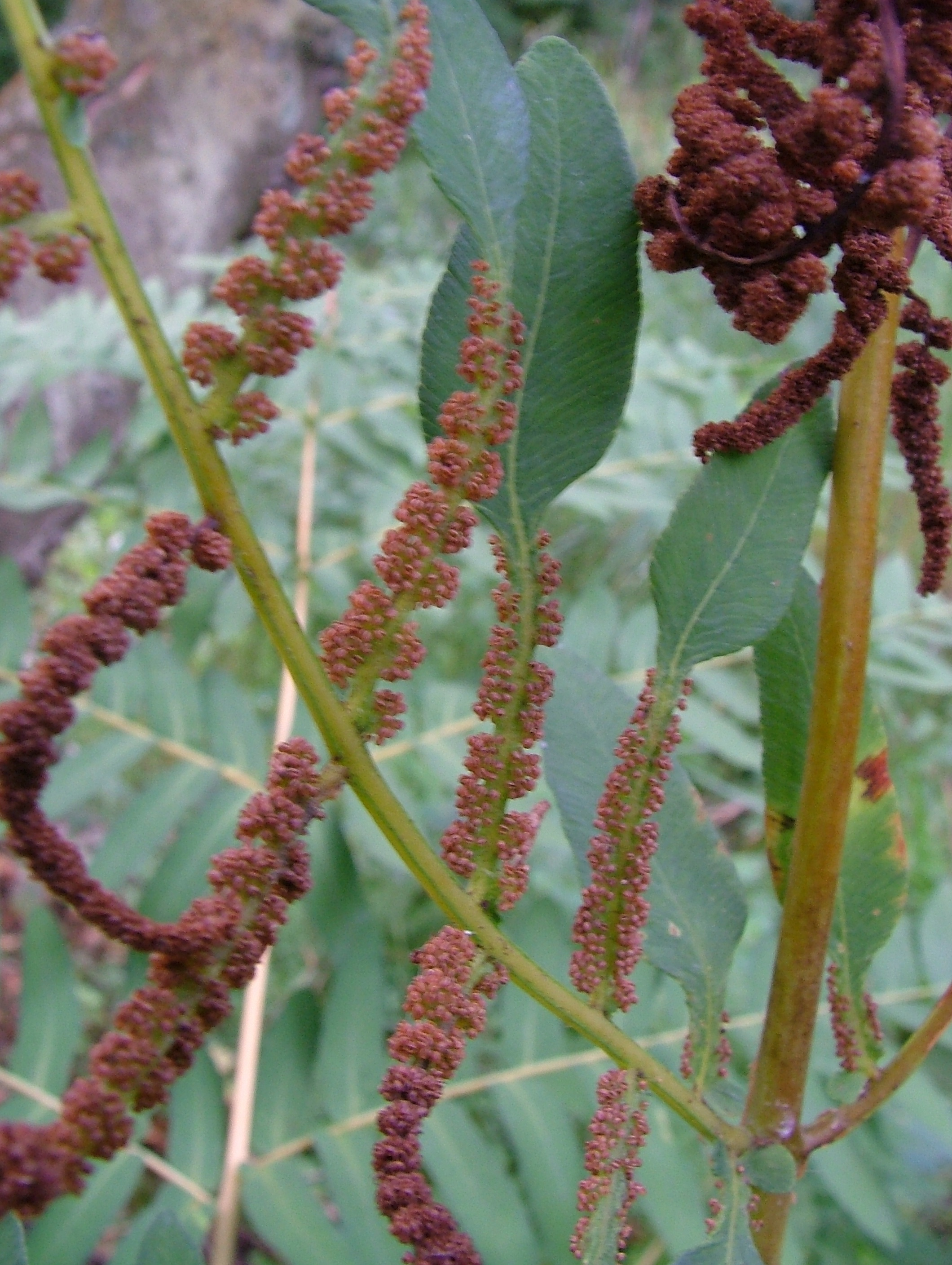 Photographie prise par Utilisateur Roukino. Détail de la formation des sporanges de l'Osmonde royale.